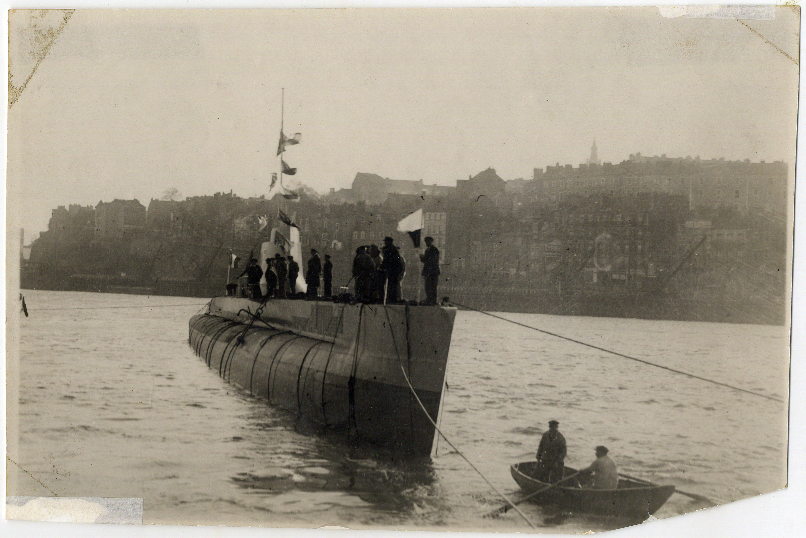 Wodowanie łodzi podwodnej ORP „Ryś”